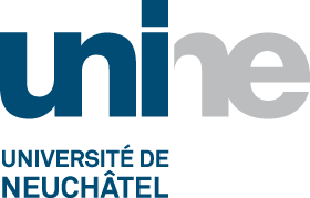 Logo de l'unine